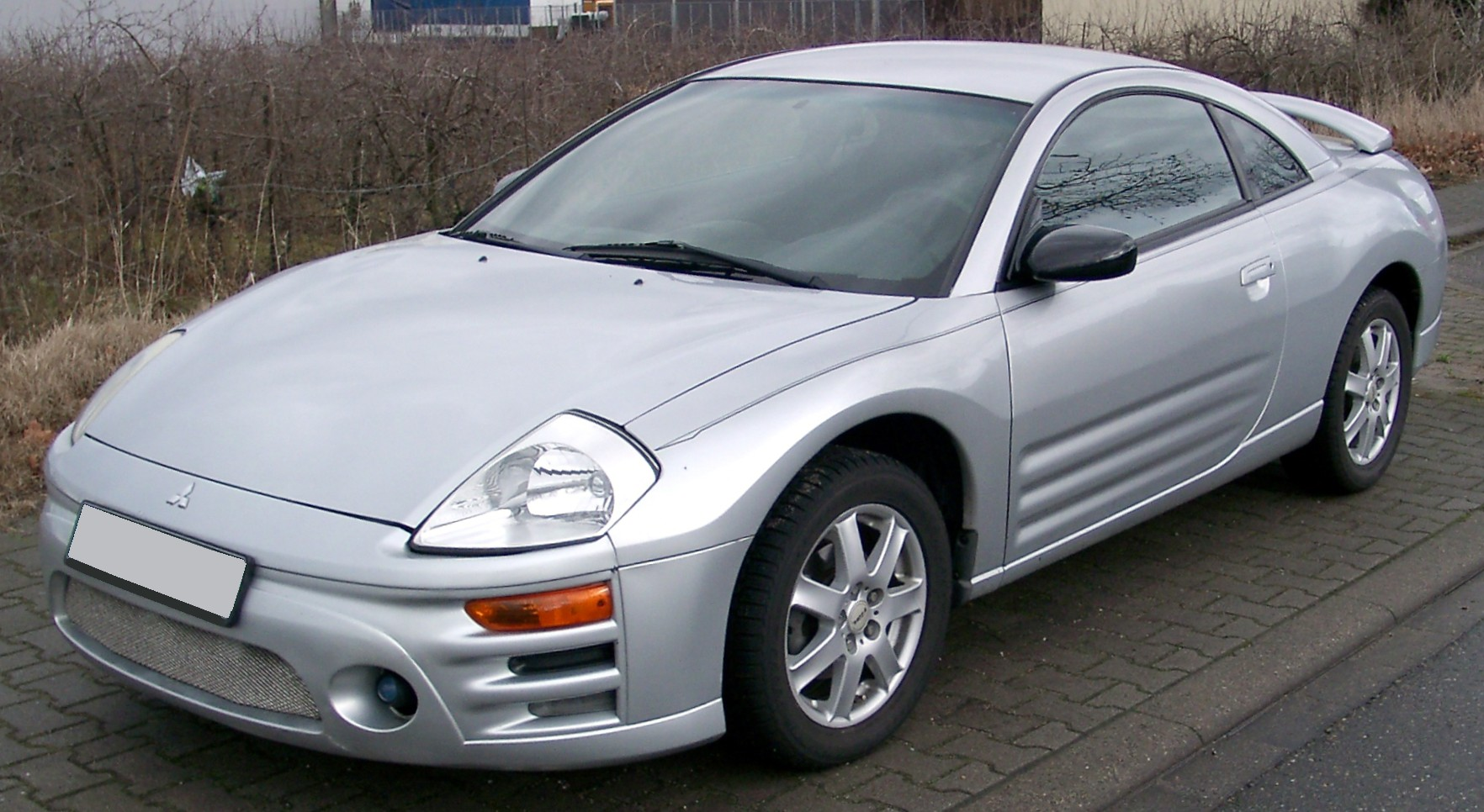 Mitsubishi Eclipse, 3. Generation